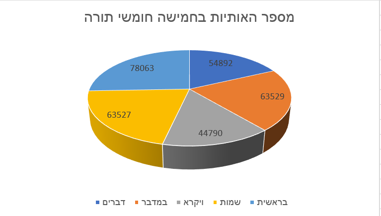 תרשים של מספר האותיות בחמישה חומשי תורה